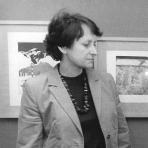 Title: Berlin, DFD-Unterschriftenaktion People in the image: Hauschild, Hannelore: Volkskammerabgeordneter, Sekretärin des Bundesvorstandes des Demokratischen Frauenbundes Deutschlands (DFD), DDR * Mehlitz, Heide Linde: Sekretärin Bundesvorstand des Demokratischen Frauenbundes Deutschlands (DFD), Vizepräsidentin Friedensrat, DDR * Rümpel, Werner: Generalsekretär des Friedensrates, DDR Factual corrections and alternative descriptions are encouraged separately from the original description. Additionally errors can be reported at this page to inform the Bundesarchiv. Original historic description: ADN-ZB Hirndorf-21.4.83-eng Berlin: Rias Mappe mit Unterschriften, Zustimmungserklärungen und Resolutionen zur Friedenspolitik der DDR übergaben Hannelore Hauschild, Mitglied des Präsidiums und Sekretär des DFD-Bundesvorstandes (rechts) und Heide-Linde Mehlitz, Sekretär des DFD-Bundesvorstandes und Vizepräsident des Friedensrates der DDR (links), an Werner Rümpel, 1. Vizepräsident und Generalsekretär des DDR-Friedensrates (Mitte). Auf 168 Veranstaltungen wurden vom DFD drei Millionen Unterschriften gesammelt.